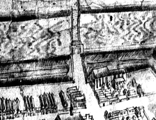 Gotycka Brama św. Jakuba w Gdańsku na "planie sztokholmskim" z ok. 1600 roku.